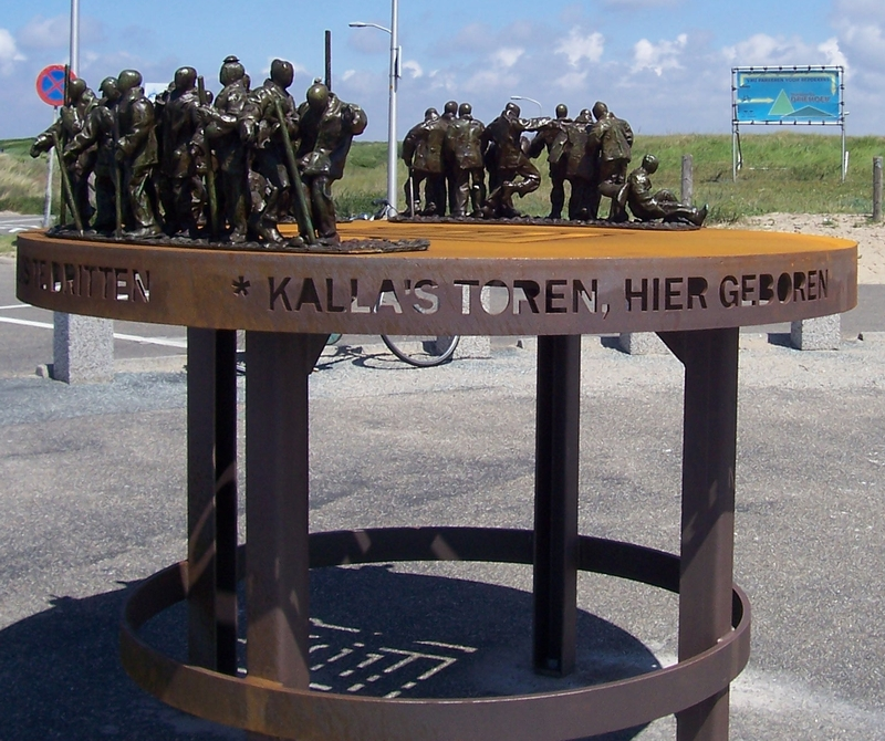 Castellum - Nicolas Dings, "Limes" kunstwerk. Onthuld op 21 mei 2010, buitensluis, Katwijk aan Zee.